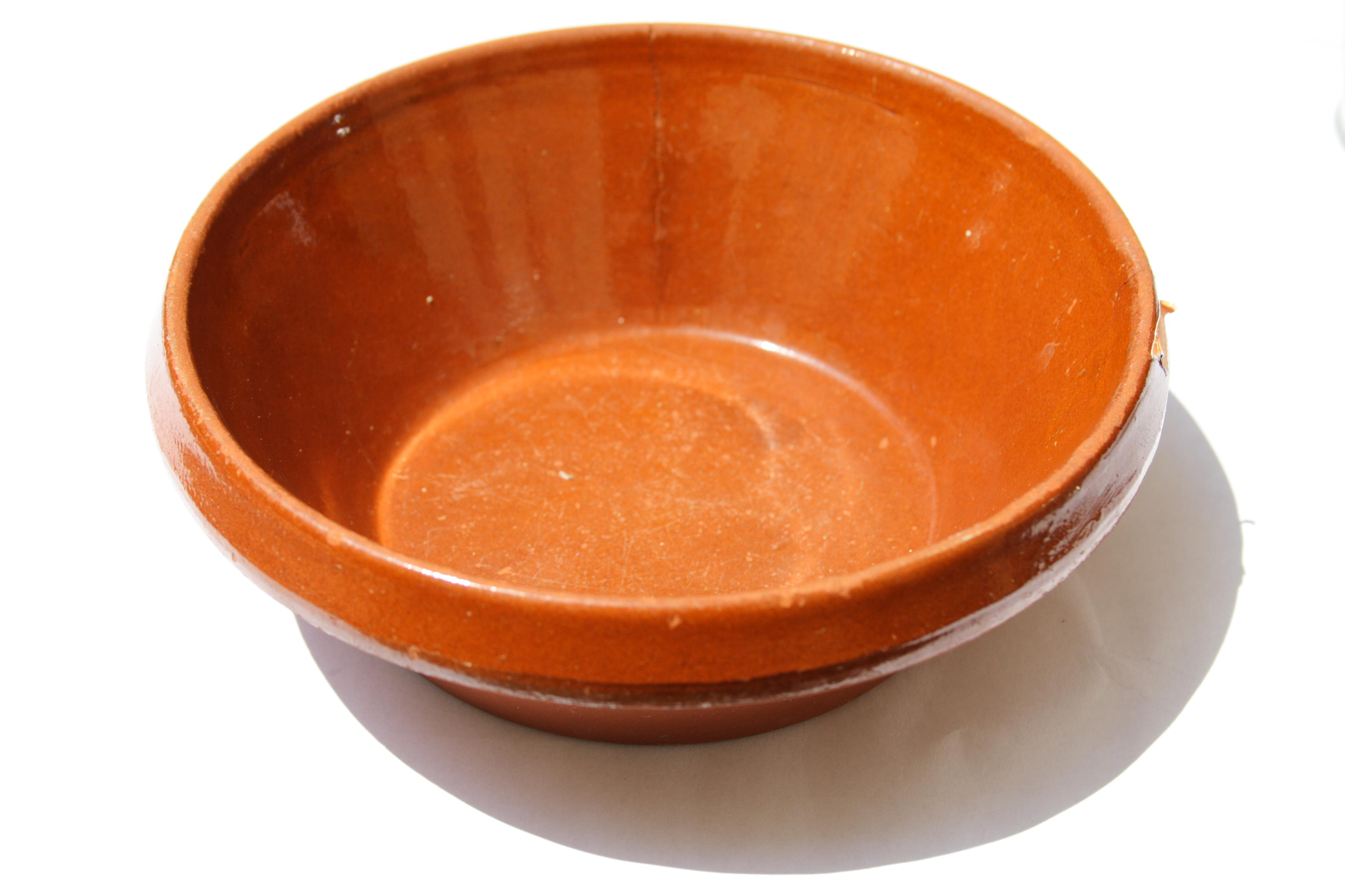 Cassoulet(Carcassonne, France)